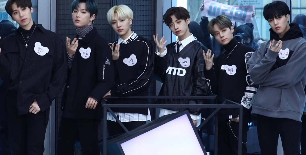 원어스 (ONEUS) @ 190115 tbs 팩트인스타 팩터뷰 포토타임.